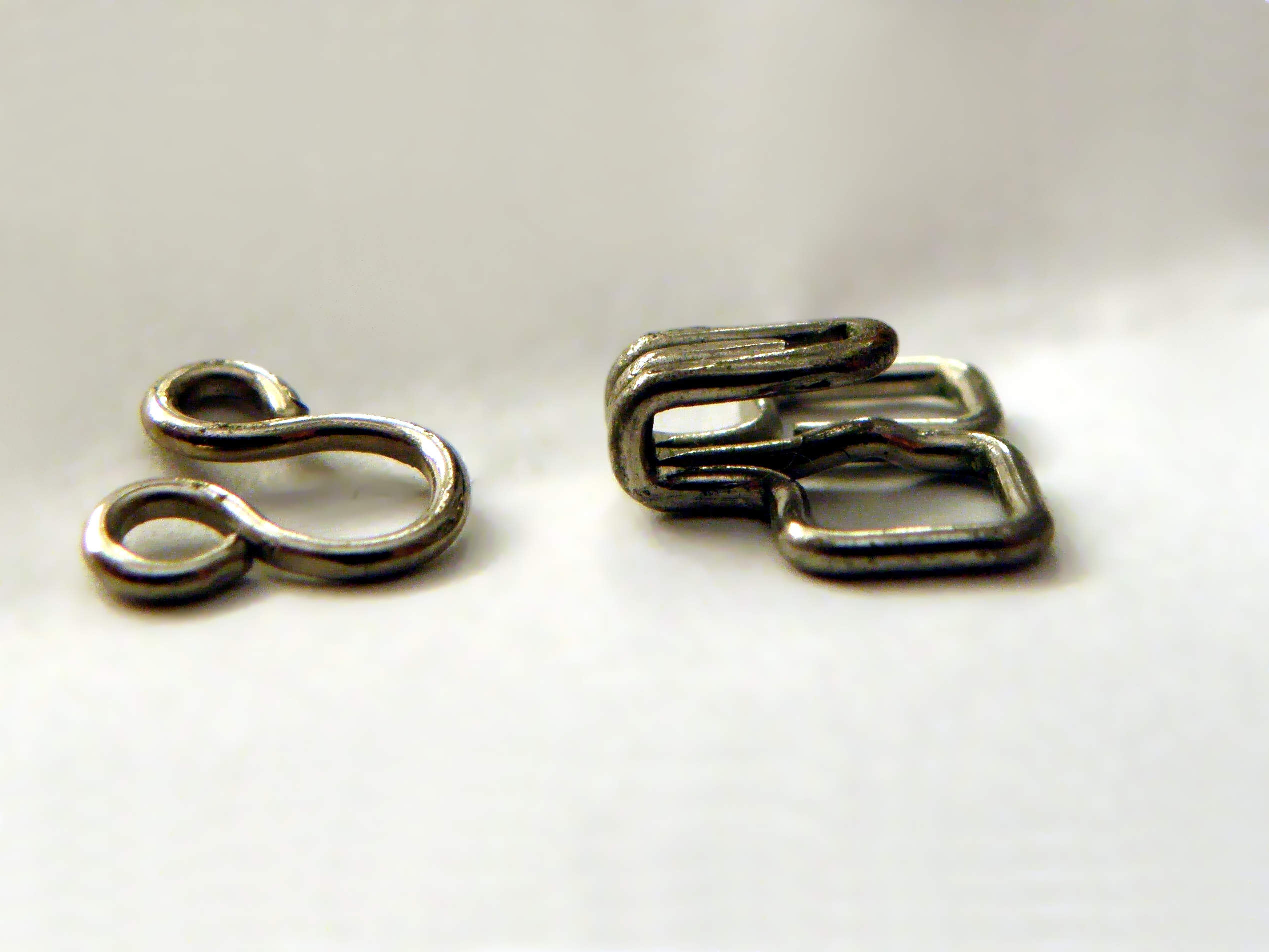 קרס ולולאה לרכיסת בגד